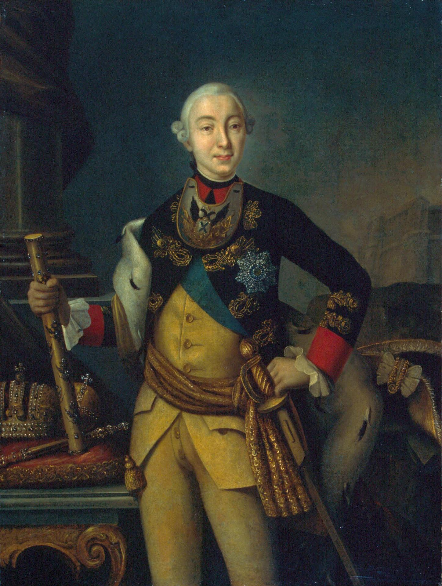 Неизвестный художник Портрет императора Петра III Россия, 1762 г. холст, масло 132,5х99 см ЭРЖ-562